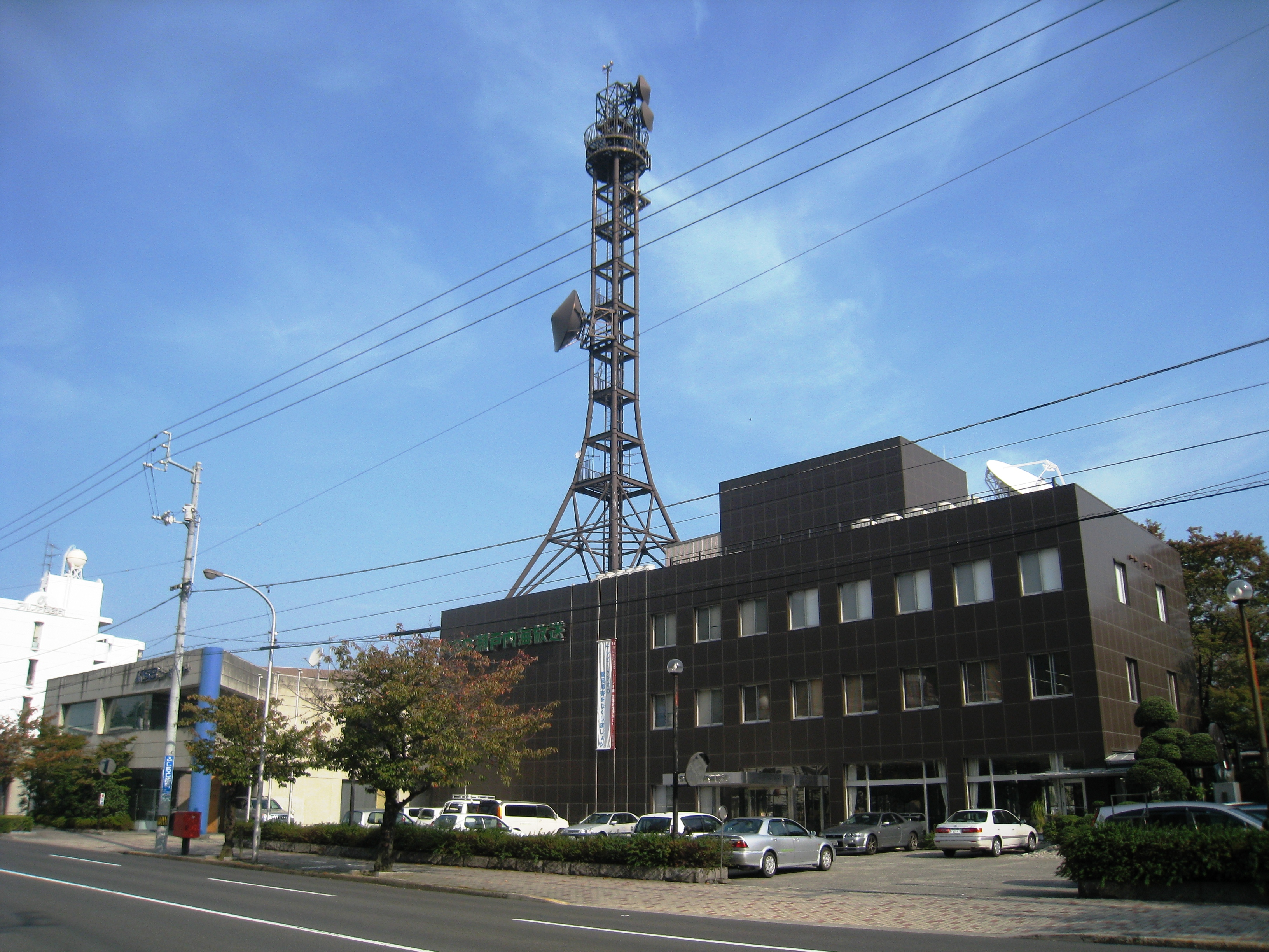 香川県高松市西宝町にあるKSB瀬戸内海放送の本社ビル。